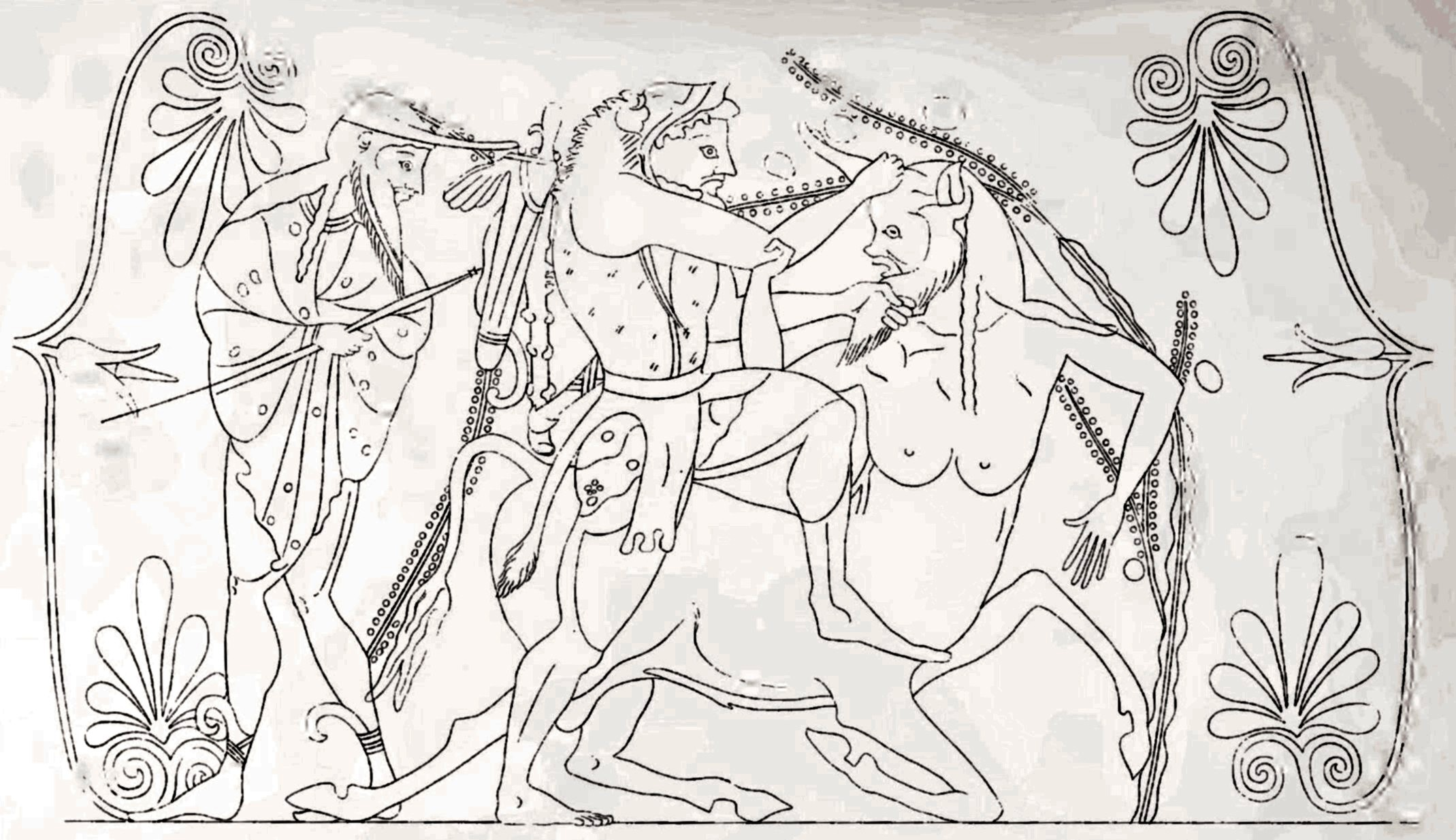 Schwarzfigurige Vasenmalerei